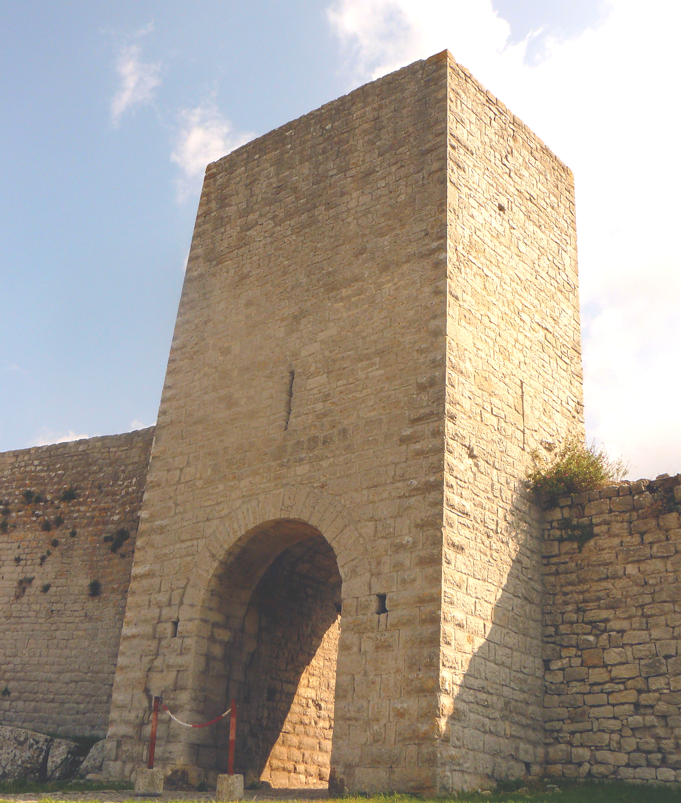 Porte de Gourdane du XIIe siècle, au nord-ouest du village de Saint-Julien le Montagnier (Gard, France).